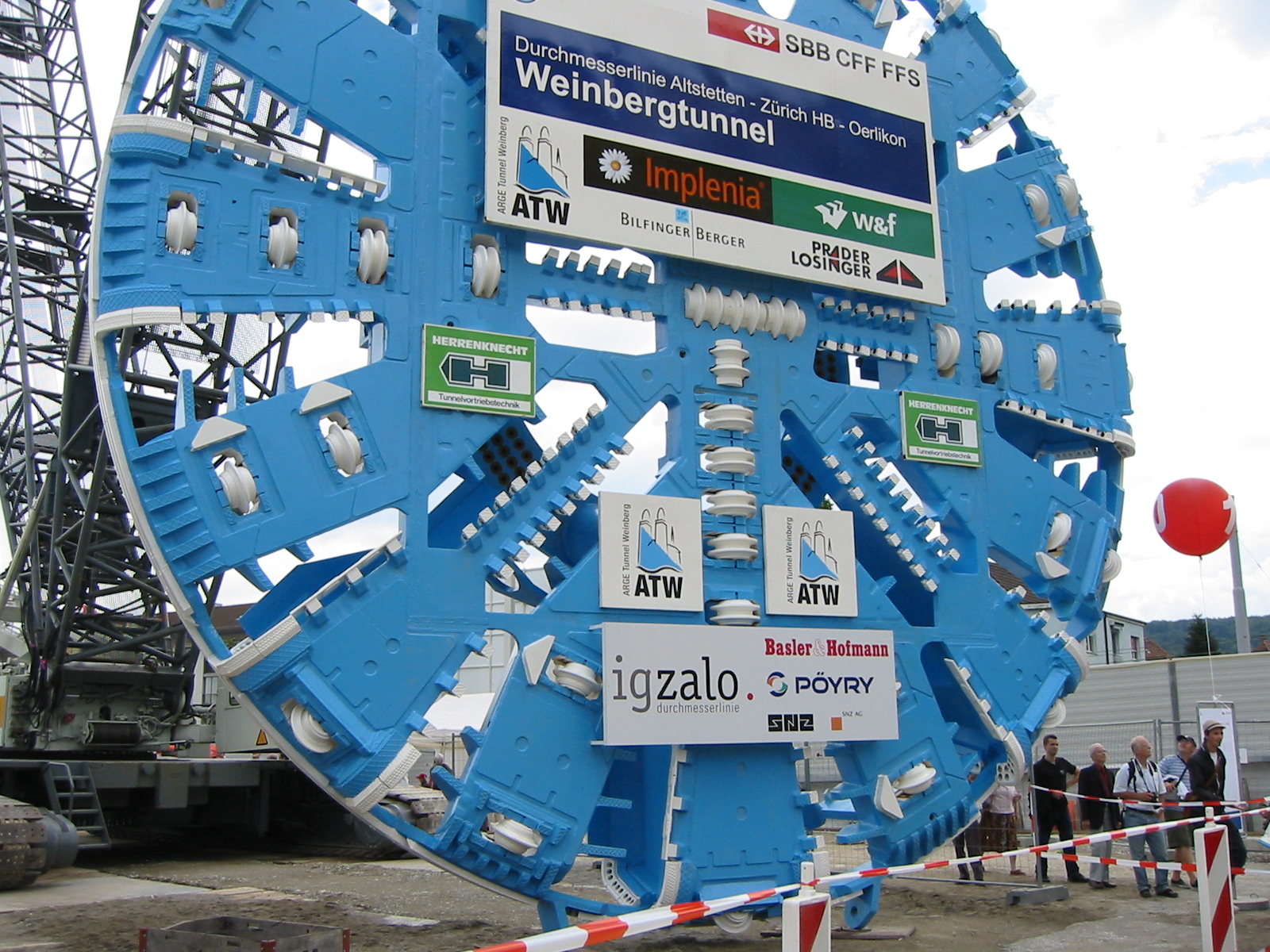 Tunnel-Bohrmaschine der Durchmesserlinie von Altstetten-Zürich HB-Oerlikon. Zu sehen am Tag der Offenen Baustelle.